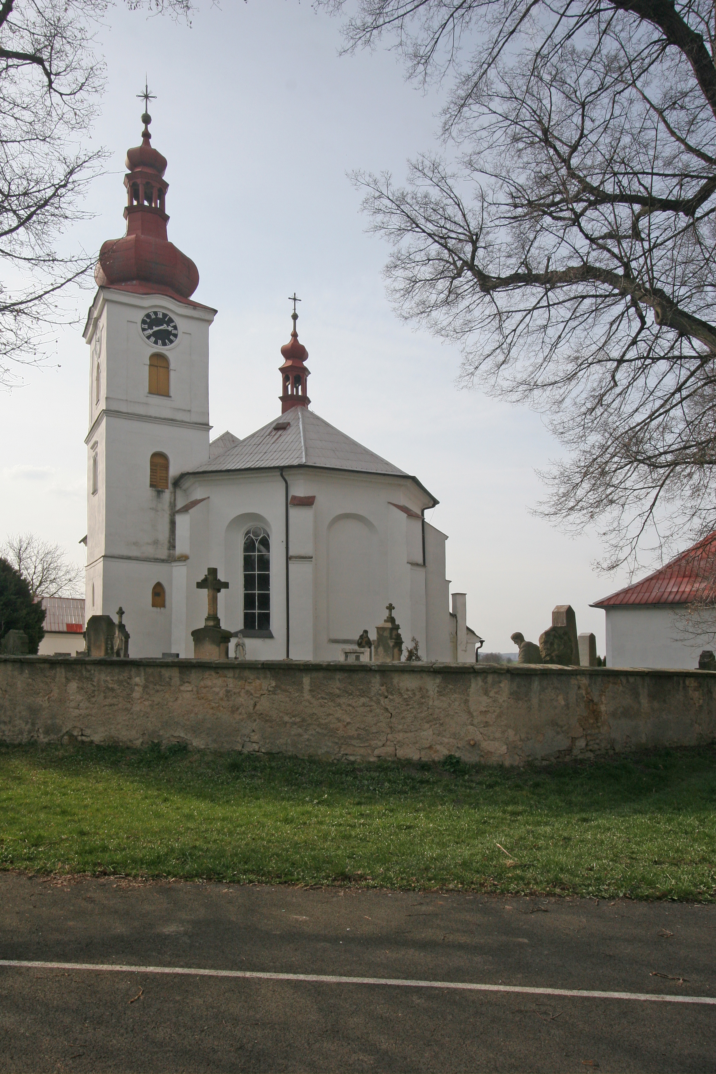 Kostel Nanebevzetí Panny Marie, Velešice